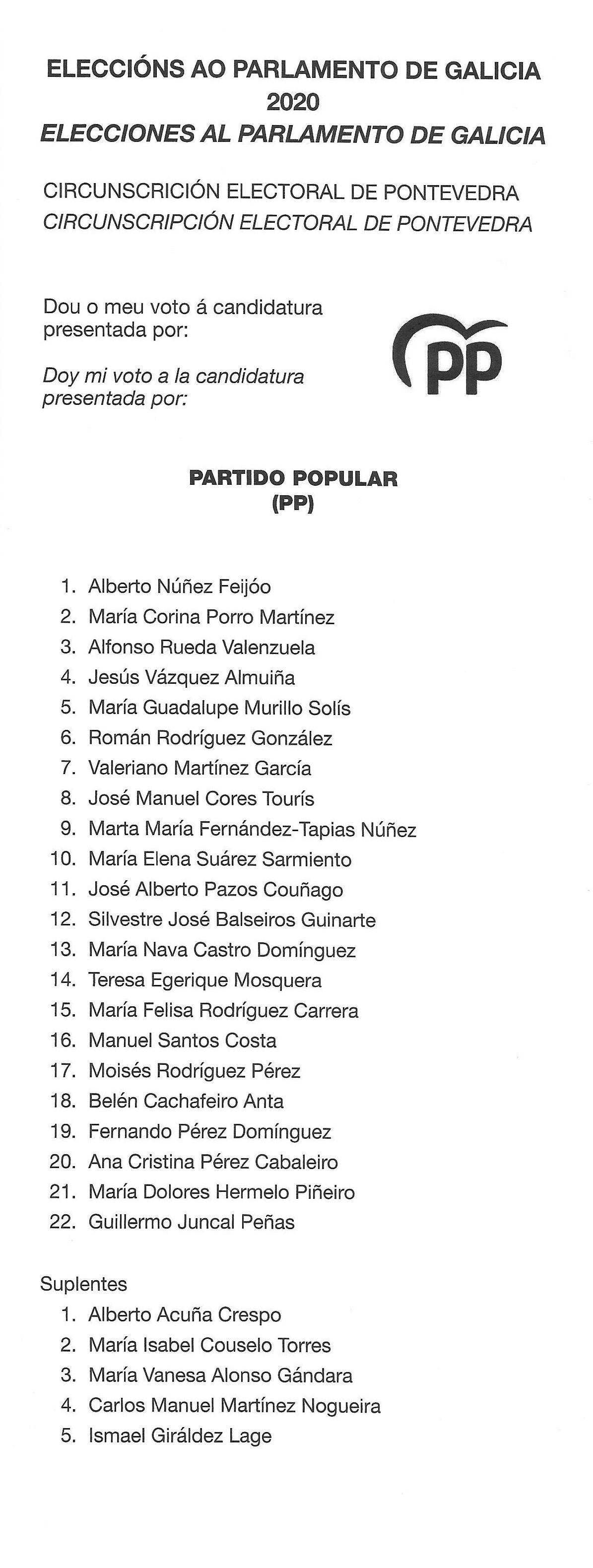 Papeletas electorais Eleccións ao Parlamento de Galicia 2020 pospostas circunscrición electoral de Pontevedra-PP.